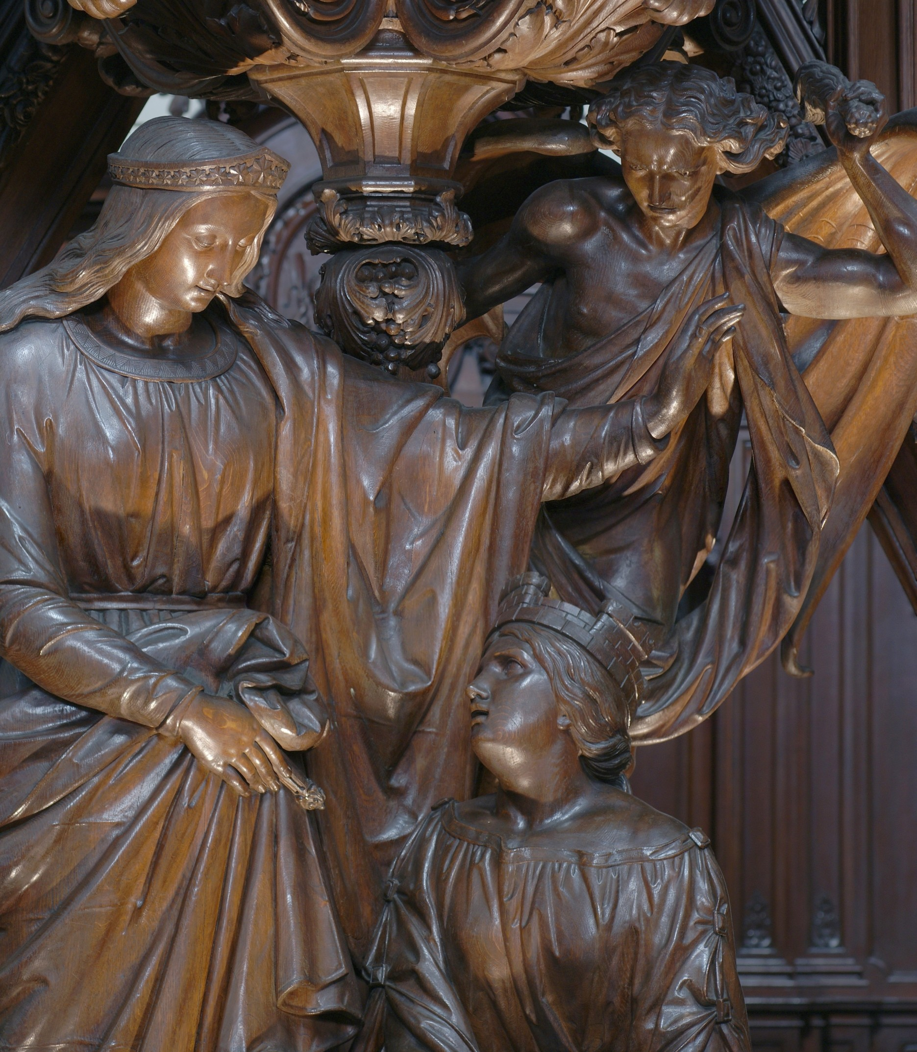 Cathédrale de St-Aubain (Namur) - Chaire de vérité sculpté par Charles Geerts (détail 2)